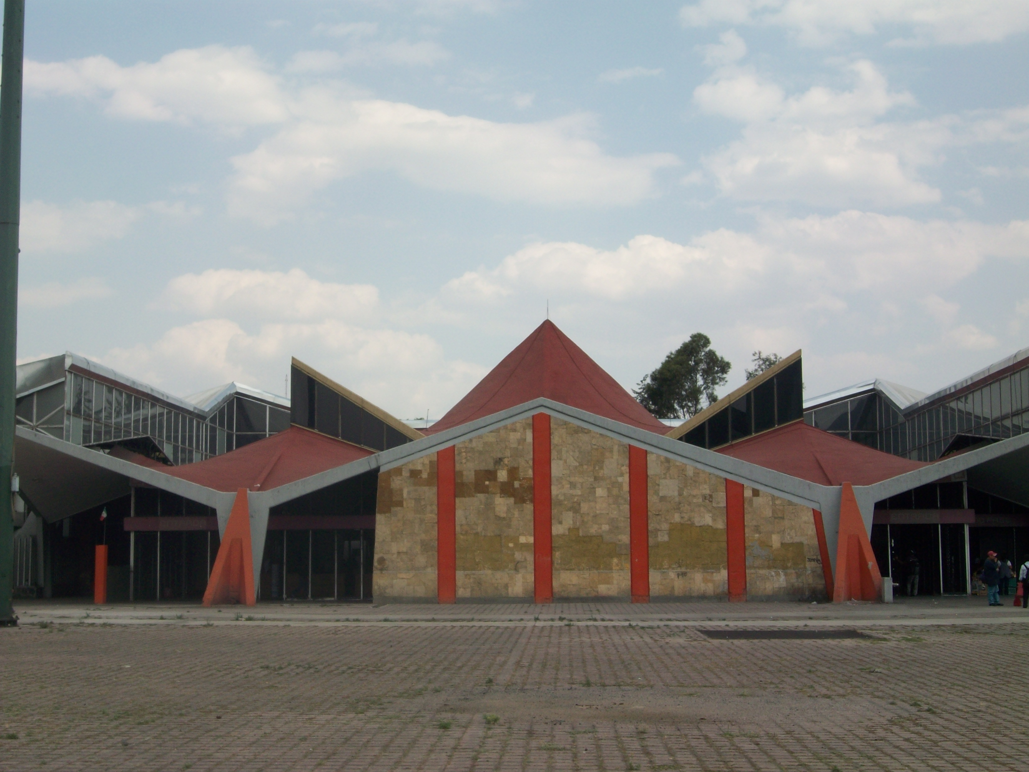 Estación San Lazaro